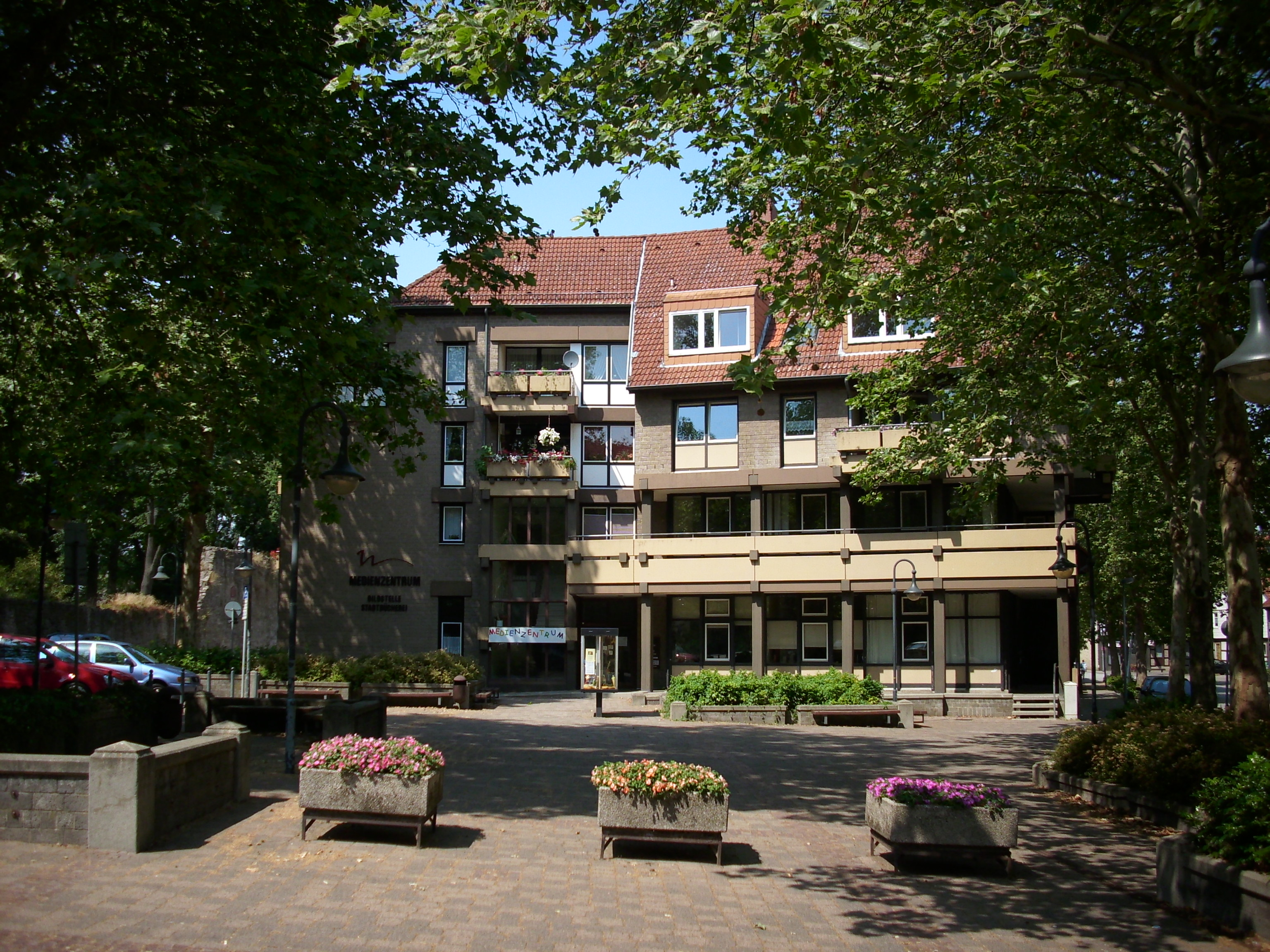 Medienzentrum und Stadtbücherei in Northeim.